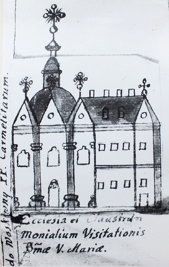 Беларуская (тарашкевіца): Вільня (Vilnia), завулак Росы (zavułak Rosy). Кляштар візытак